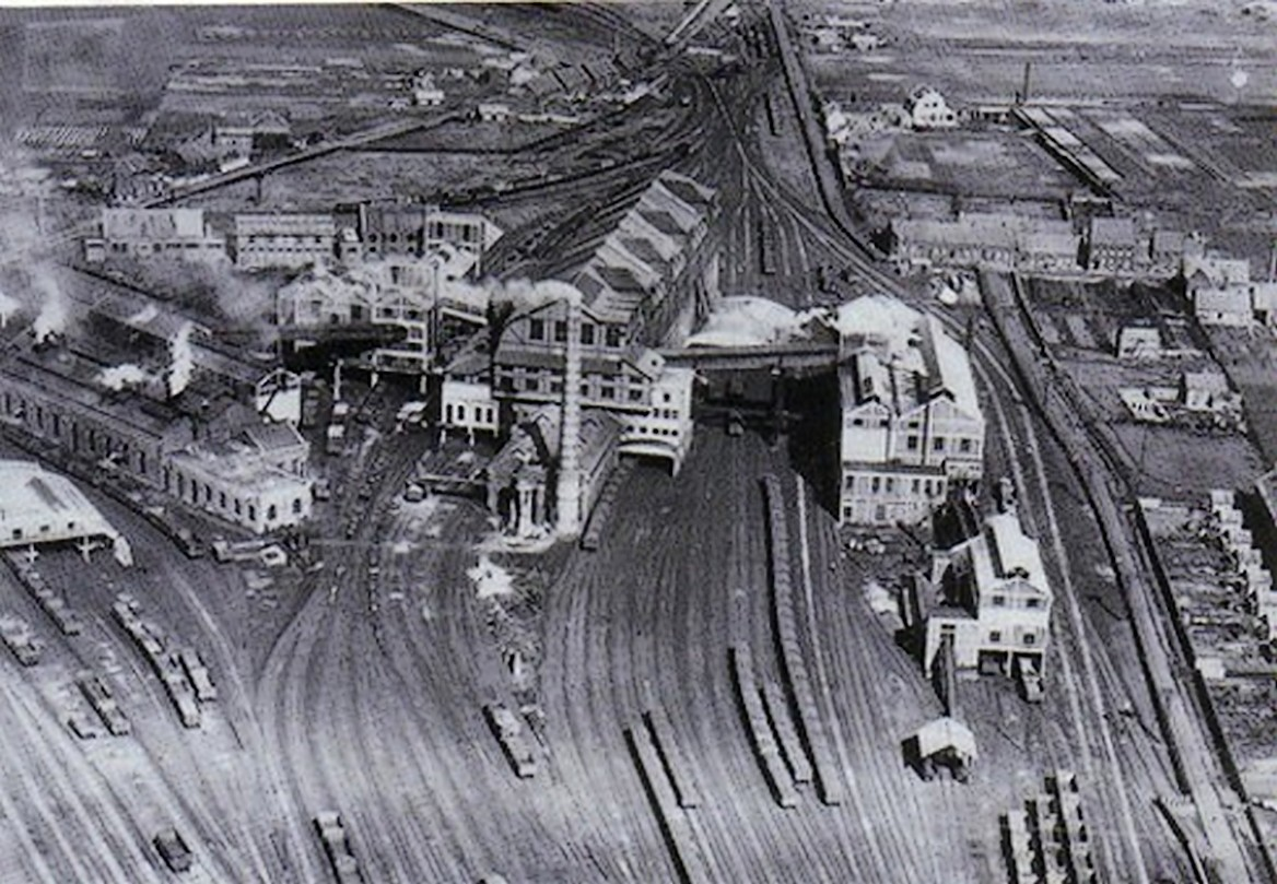 Usines la Briquetterie à Somain , ensemble démoli dans les années 1970 et qui permettait avant de fabriquer des produits à base du charbon provenant des fosses de la Compagnie des mines d'Aniche . À droite , vous pouvez apercevoir le quartier La Renaissance , démoli dans les années '70 afin de laisser place à la Zone Industrielle.